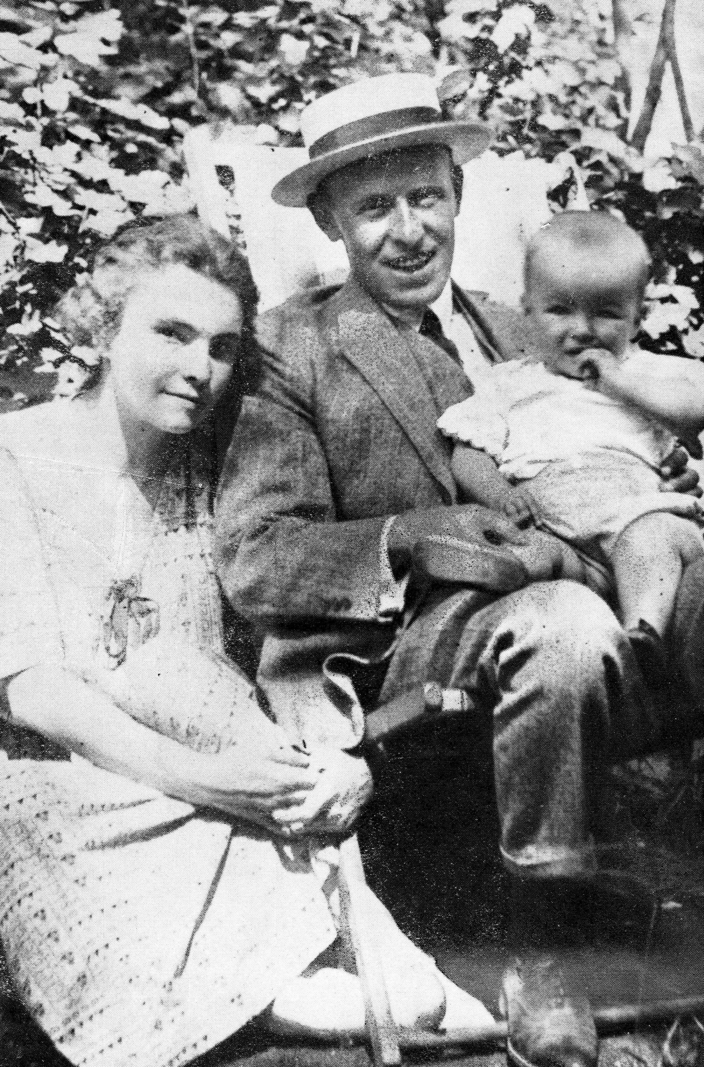 Ludmila Vančurová s rodinou, 1923